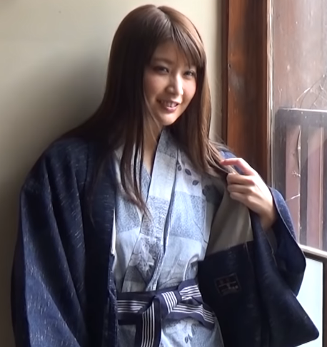 沢すみれです。